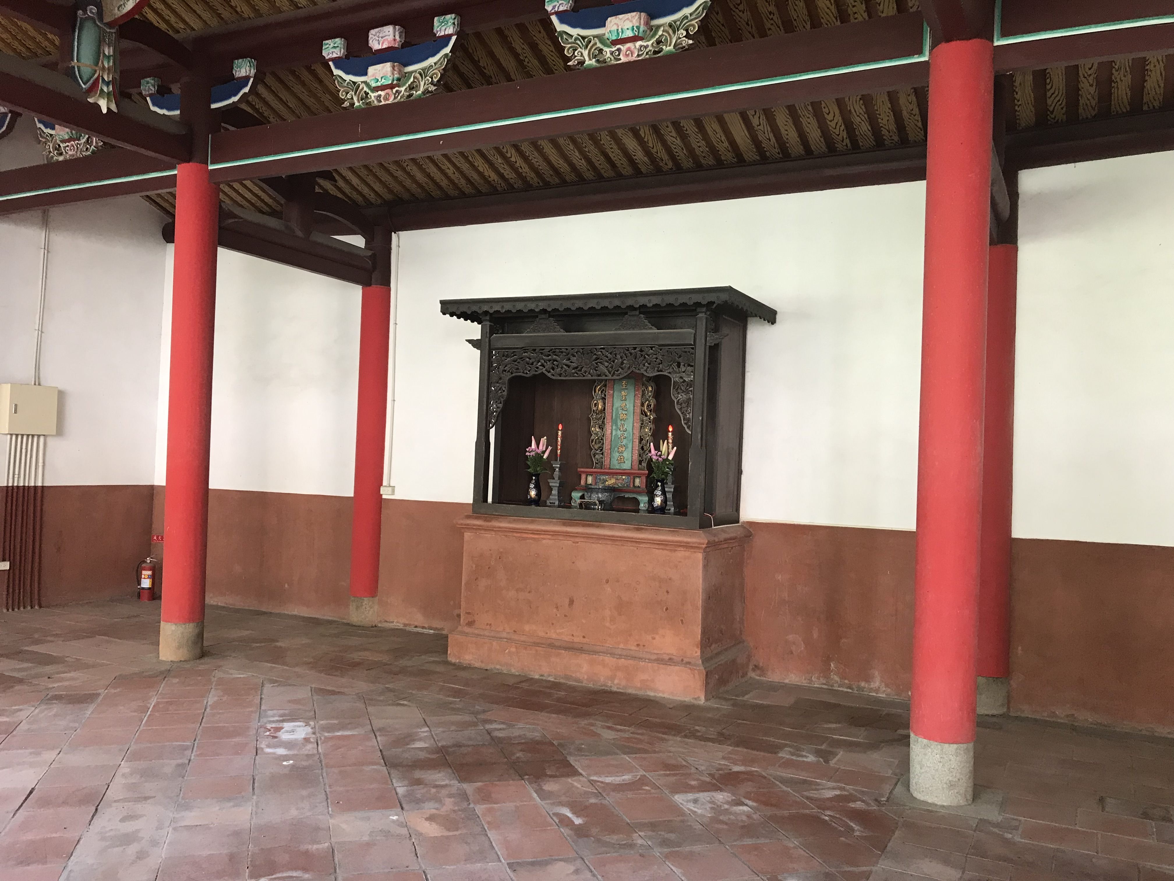 鳳山舊城孔子廟崇聖祠孔子神位